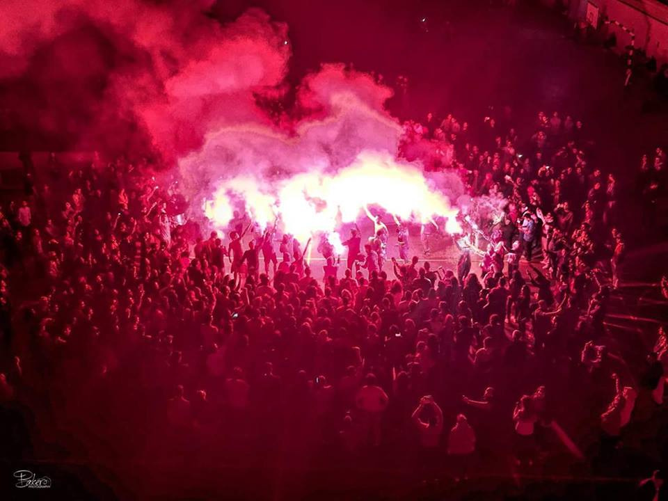 Journée des olympiades à l'ENSIAS au Maroc , une journée crée et organisée par des élèves ingénieurs. This is an image of "African people at work" from Morocco